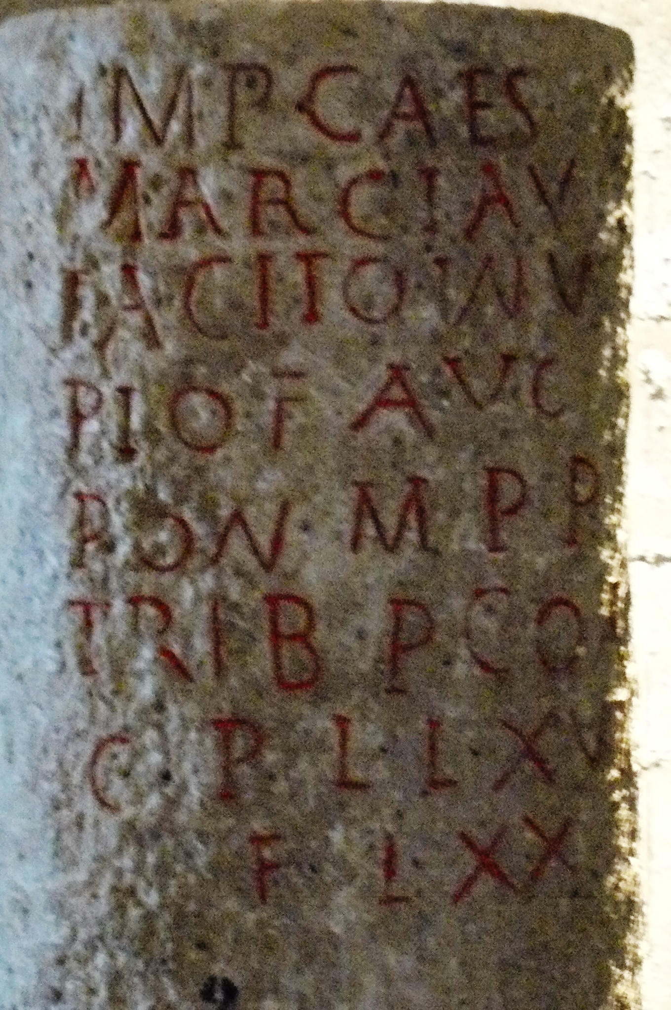 Borne milliaire (leugaire) dédicacée à Marcus Claudius Tacite, provenant des fouilles effectuées vers 1847 dans la commune de Rom (Rauranum), et conservée dans les collections des musées communautaires du Niortais (n° inv. 847.1.1). La borne est exposée au musée du Donjon à Niort).Le texte de CIL XIII, 09062 CIL XVII2, 00433 sur Epigraphik-Datenbank Clauss-Slaby.Un dessin sur la base Mémoire du ministère de la Culture français. Nota : Deux autres bornes proviennent de Rom, dont une, conservée aussi à Niort, est dédicacée à Tetricus Ier.